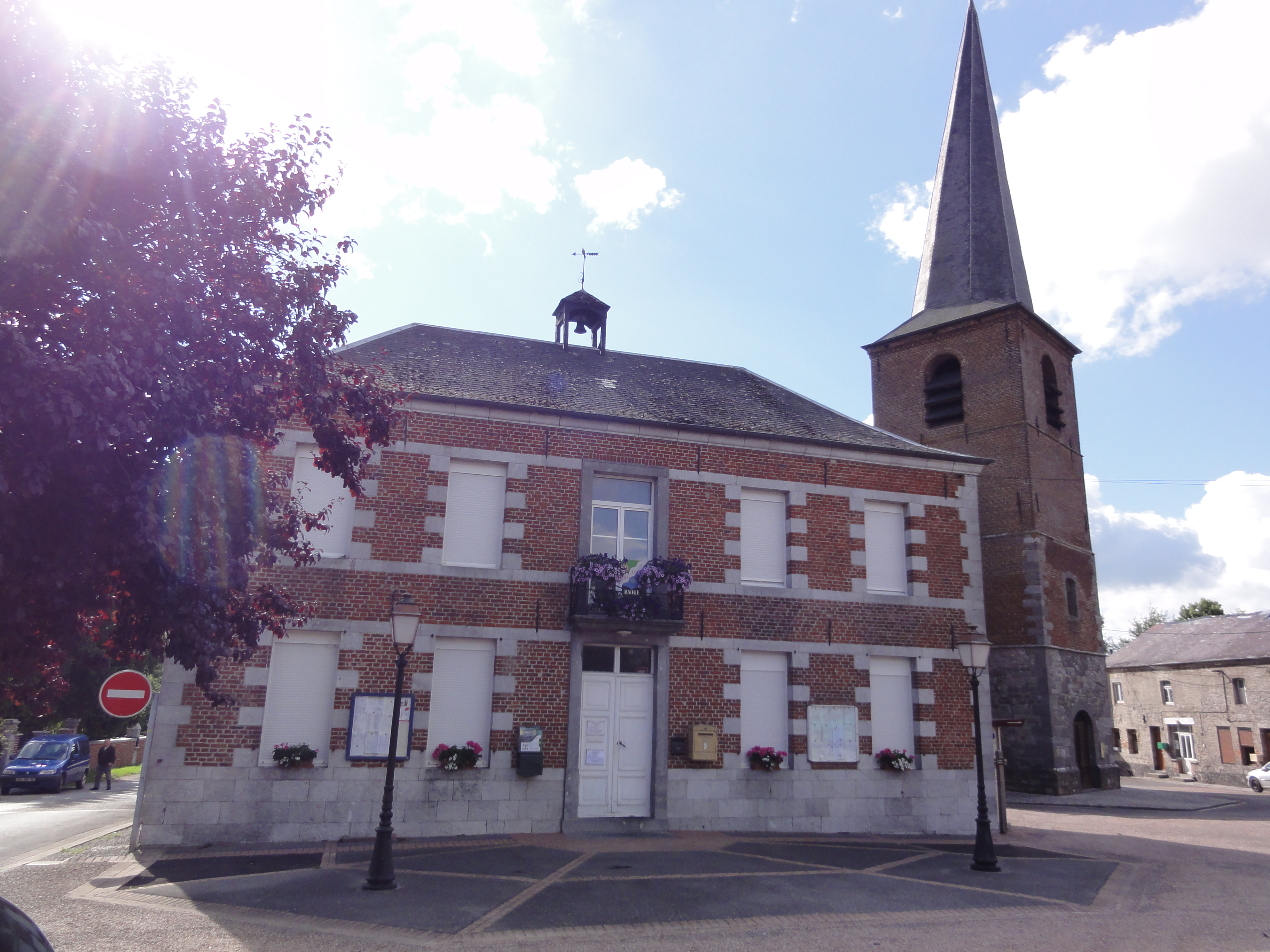 Taisnières-en-Thiérache (Nord, Fr) mairie et tour de l'eglise